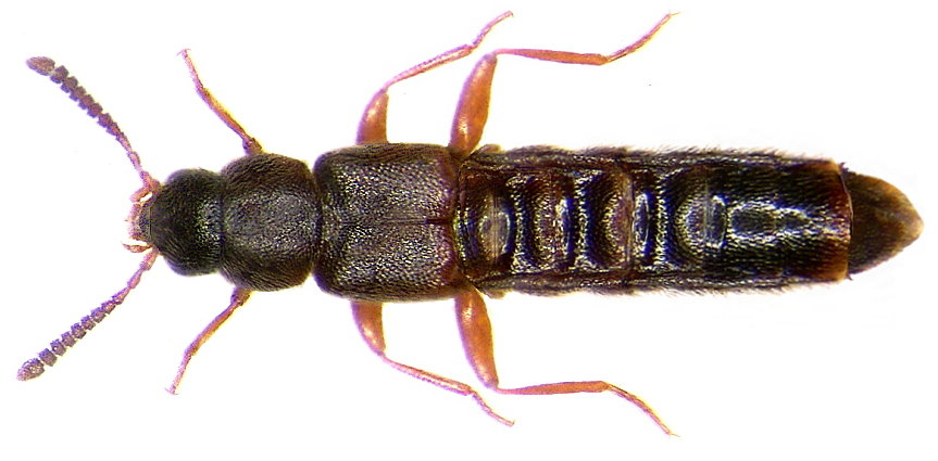 Familie: Staphylinidae Groesse: 2,7-3,2 mm Verbreitung: Europa Ökologie: unter Baumrinde Fundort: Germania, Bayern, Oberfranken, Selbitz leg.det. U.Schmidt, 2003 Foto: U.Schmidt, 2005